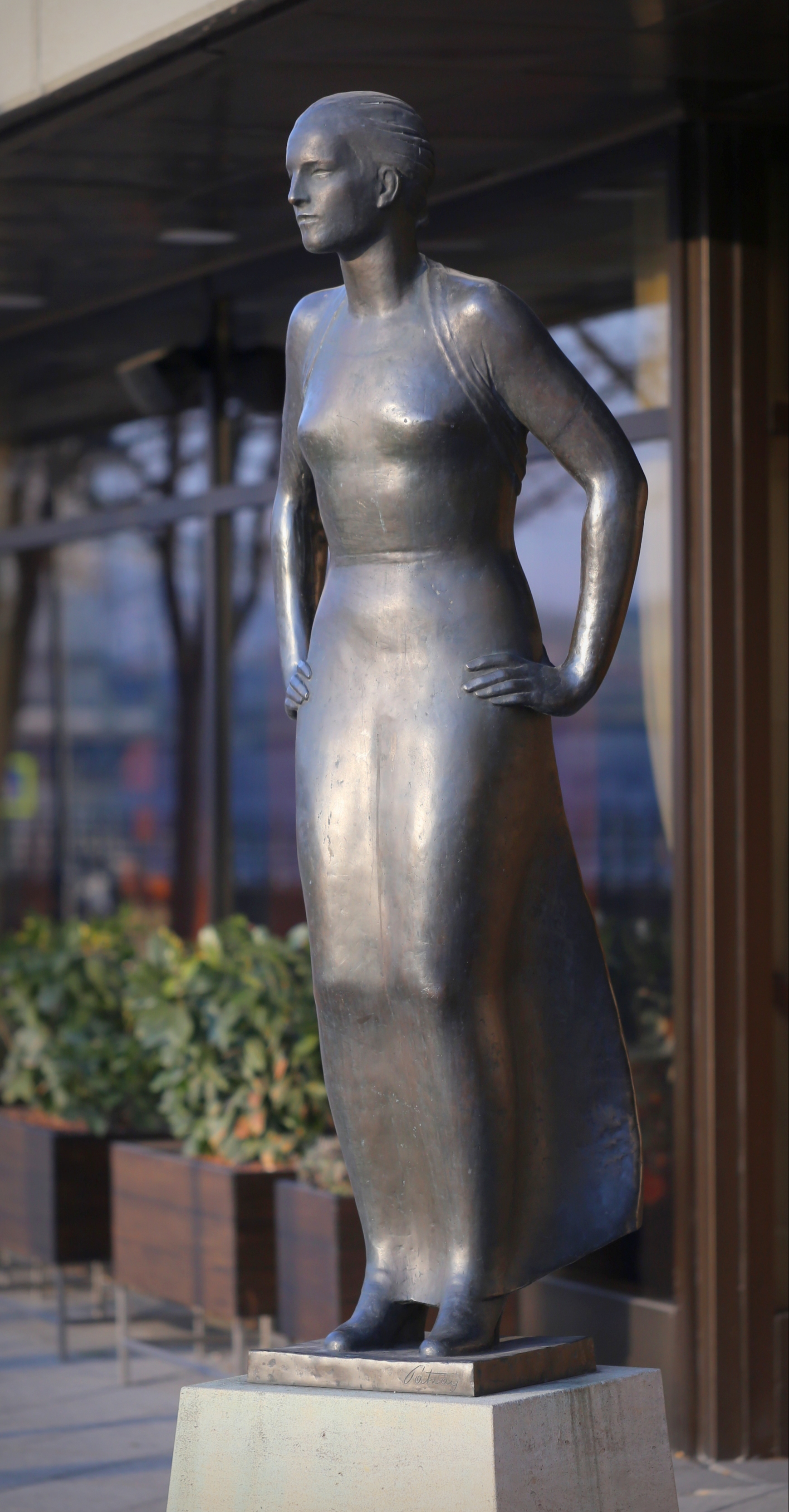 "Dunai szél" szobor (Pátzay Pál, Finta József (építész), 1994) a pesti Duna-korzón.- Magyarország, Budapest, V. kerület, Dunakorzó (A hajdan a Ritz Szálló elött, ma a Hotel Intercontinental Dunakorzó felöli oldalán található)